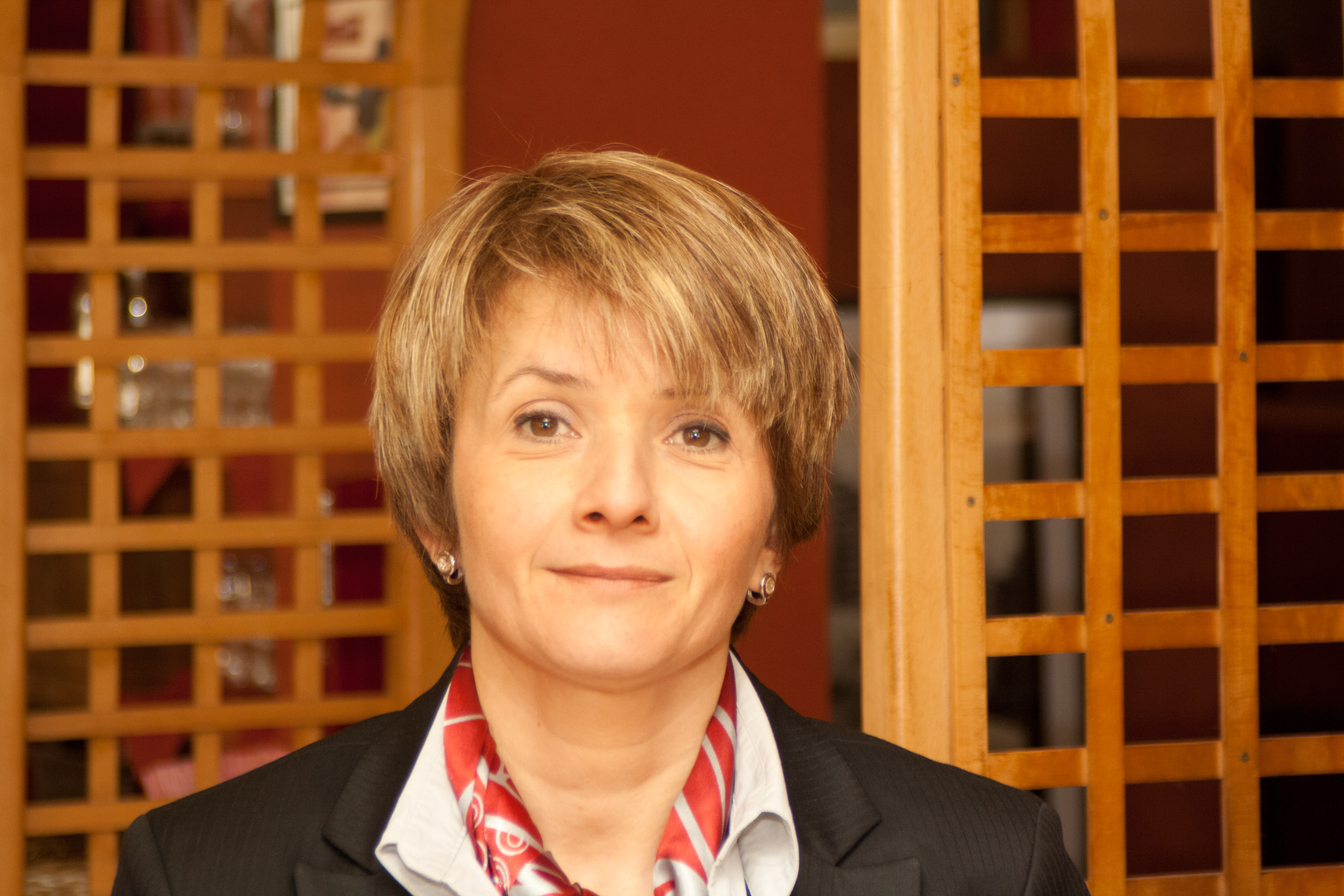 Zülfiye Kaykin, SPD, Duisburg, Bundesverdienstkreuz, Merkz Moschee